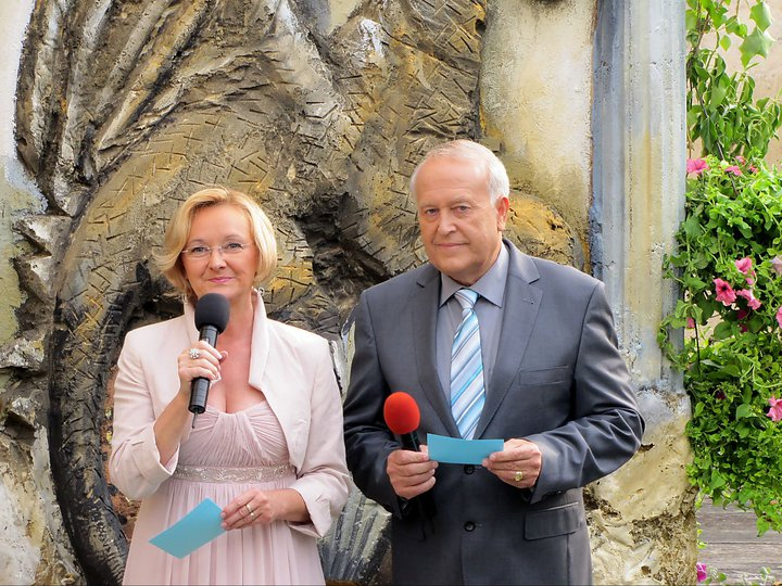 Dolgoletna voditelja festivala Vurberk Ida Baš in Janez Toplak.